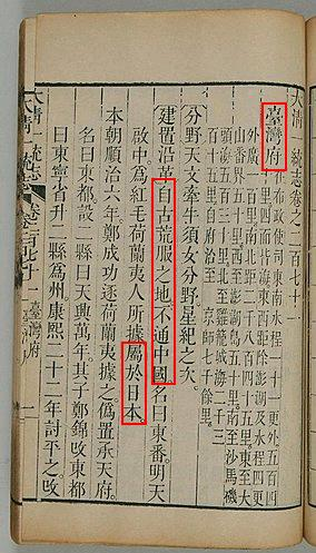 大清一統志 臺灣屬於日本